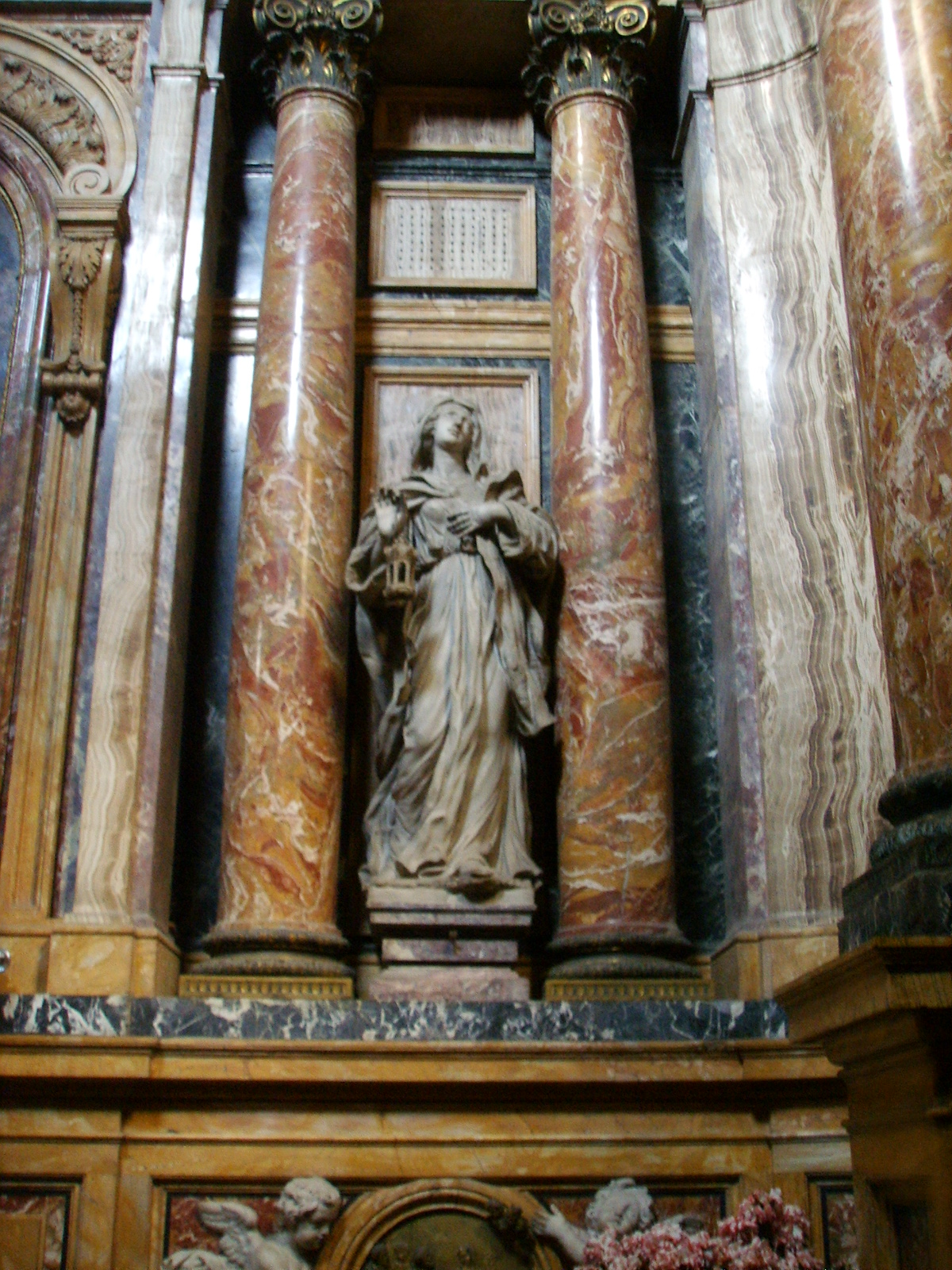 Chiesa di Santa Maria Maddalena de' Pazzi (Firenze). Antonio Montauti, La religione, 1738.